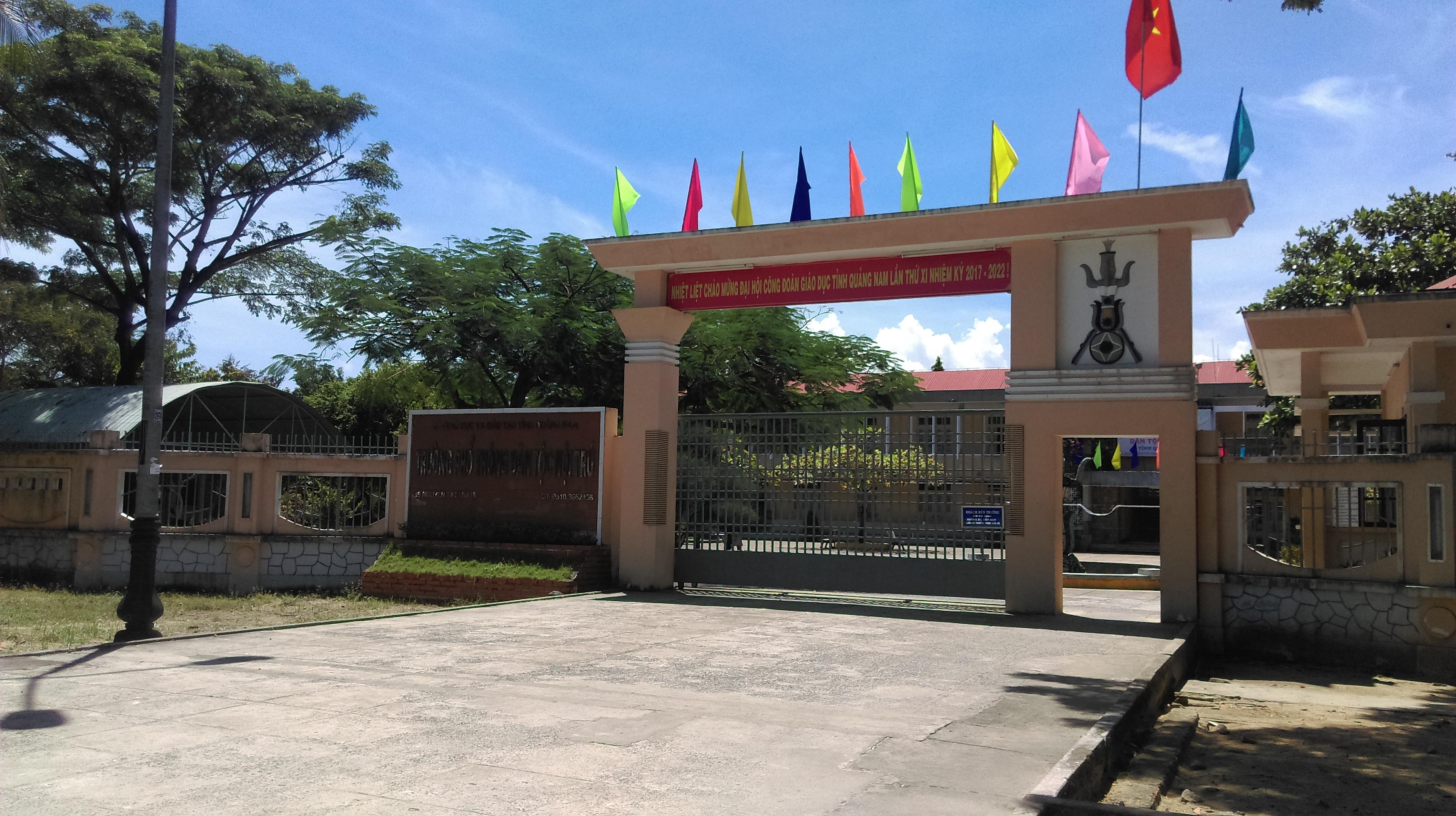 Trường PTDTNT tỉnh Quảng Nam